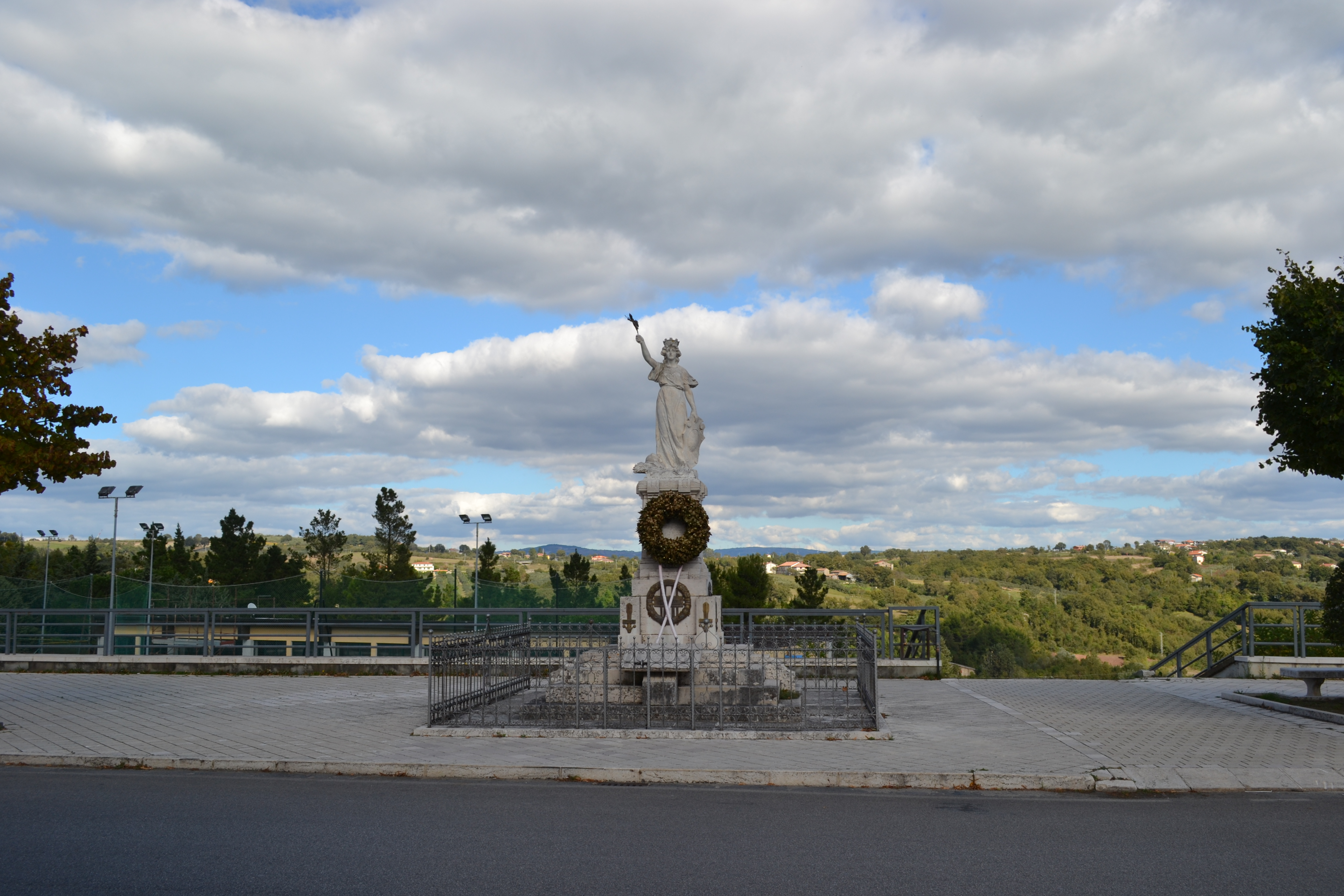 Monumento in onore dei caduti di guerra This is a photo of a monument which is part of cultural heritage of Italy.